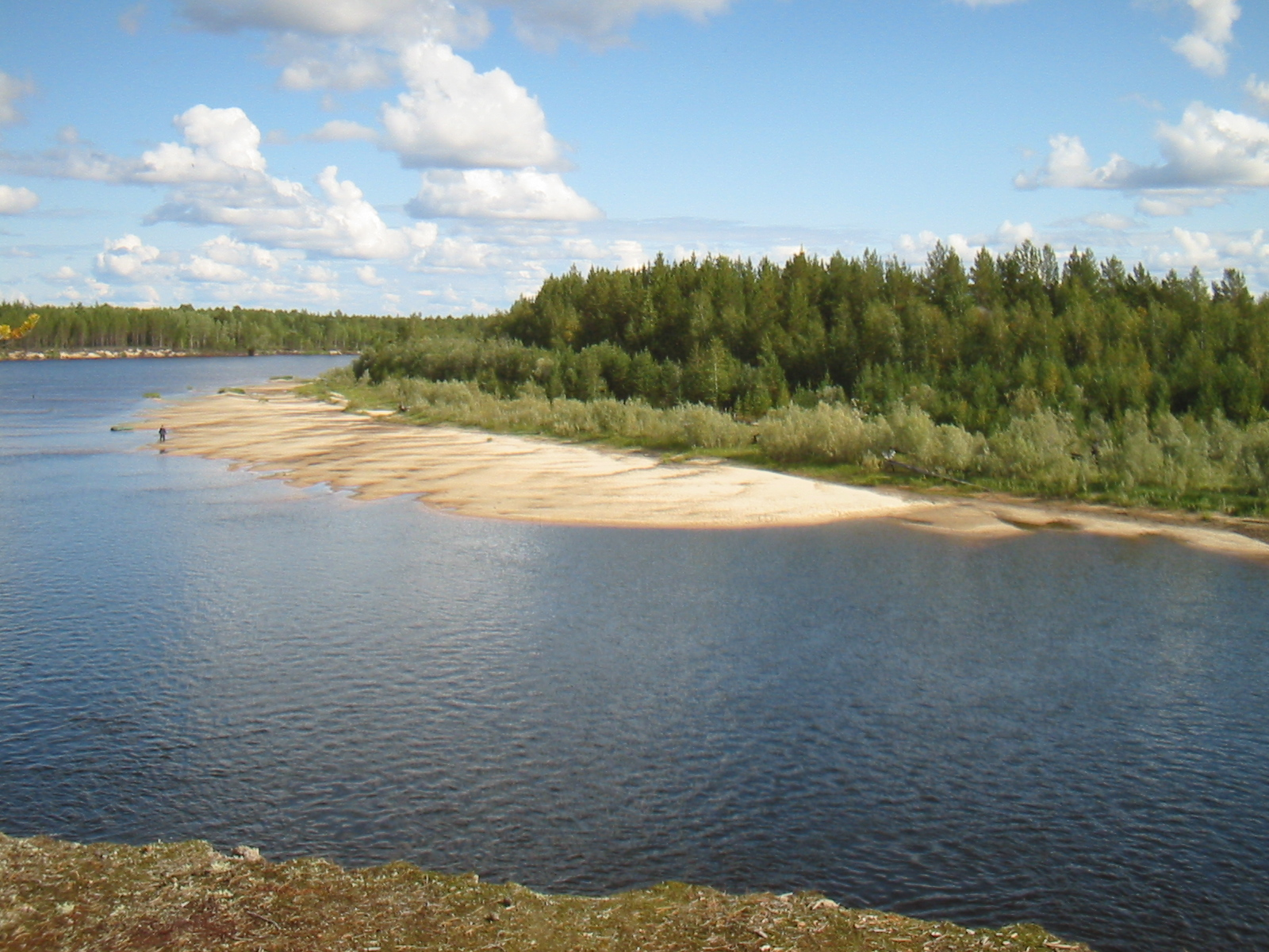 Река Тромъеган.